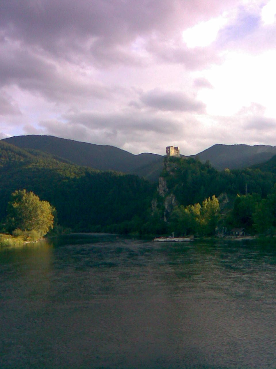 Strečniansky hrad